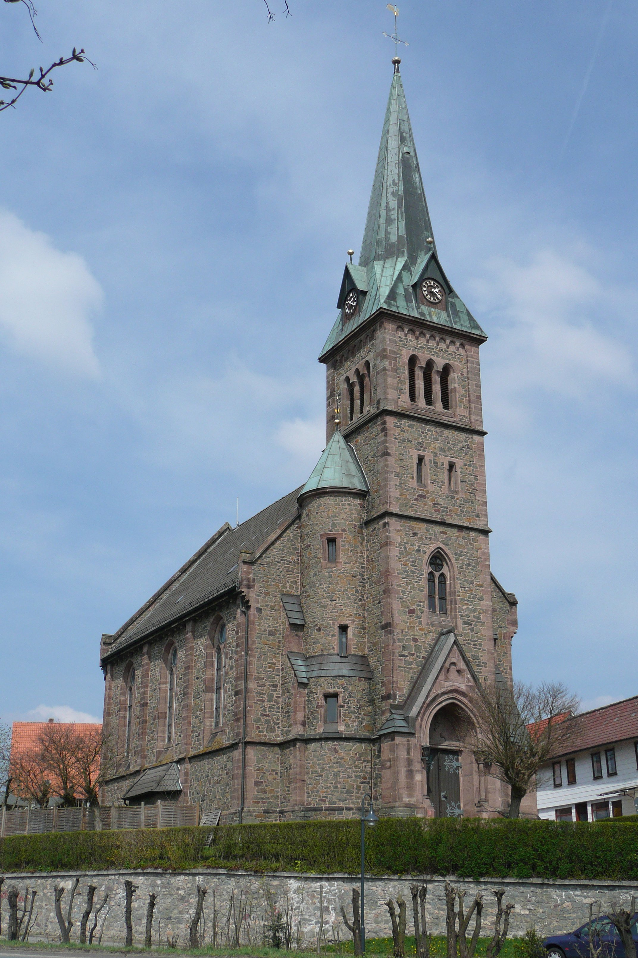 Katholische Kirche St. Josef in Herzberg am Harz